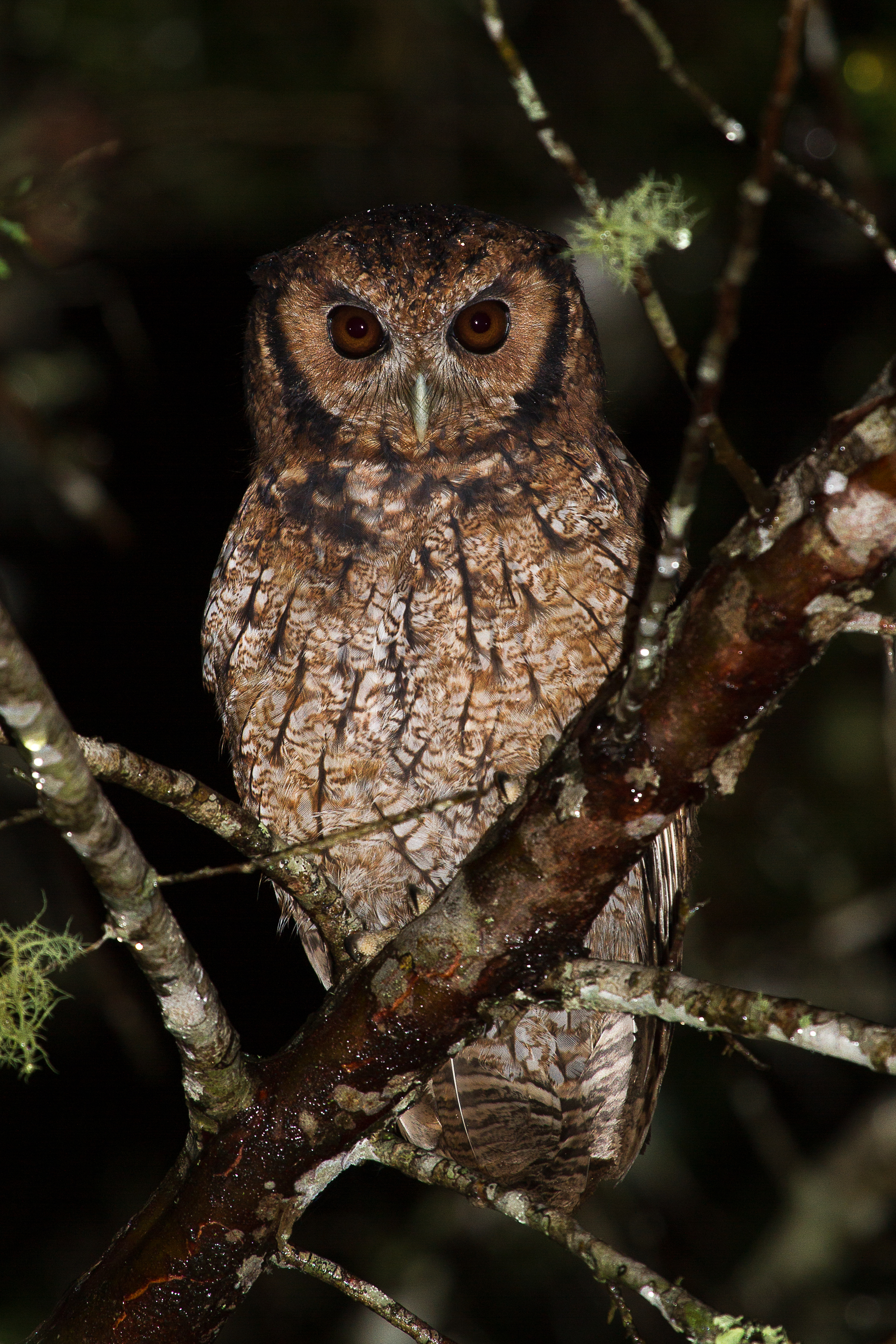 Corujinha-do-sul (Megascops sanctaecatarinae) no Parque Estadual Intervales